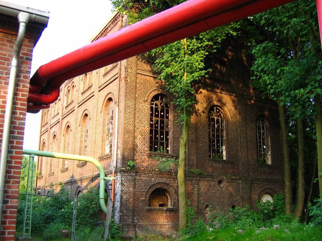 Unser Fritz 2/3 eigenes Foto